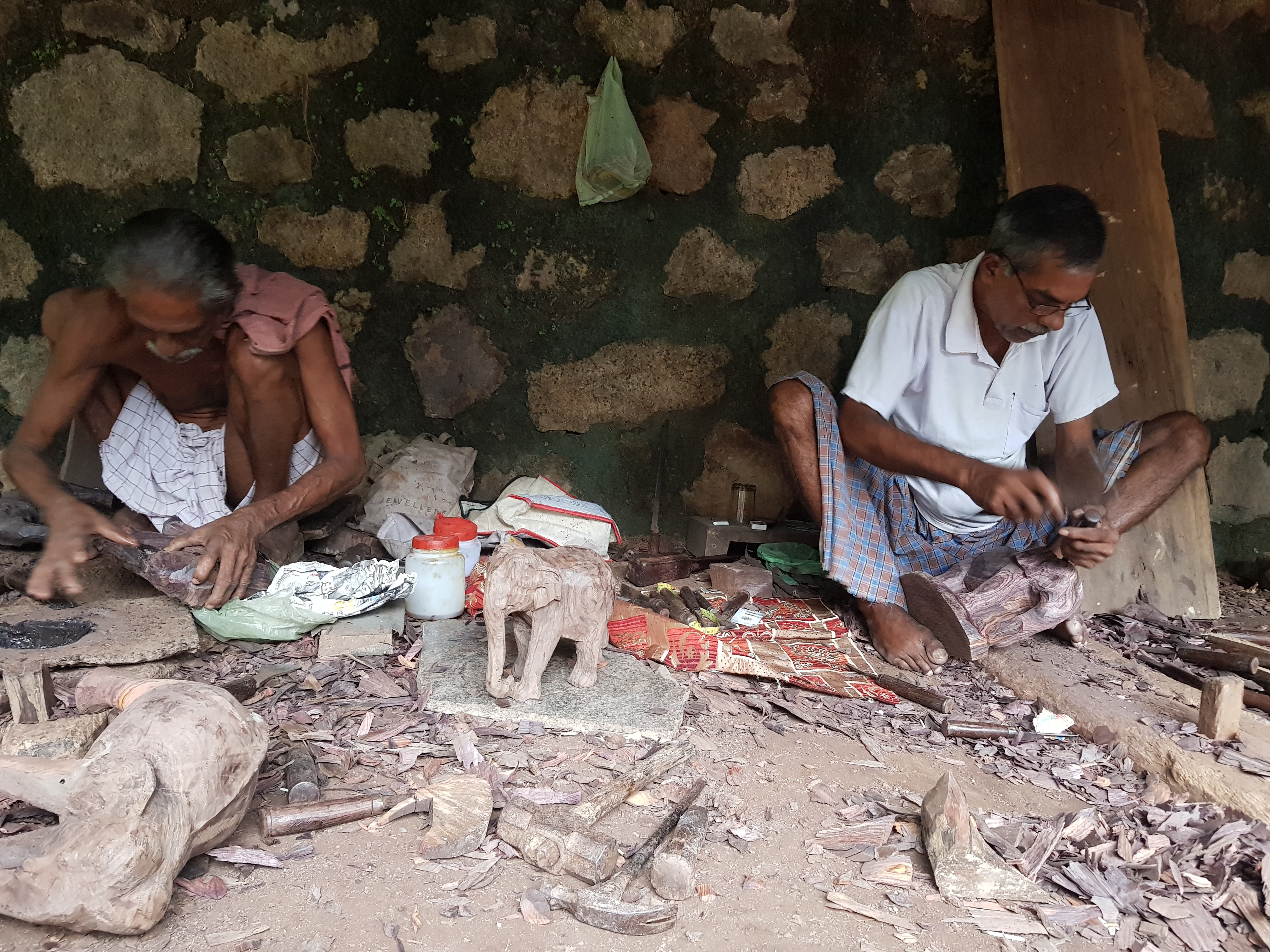 ആര്യനാട് കലാ ഗ്രാമം